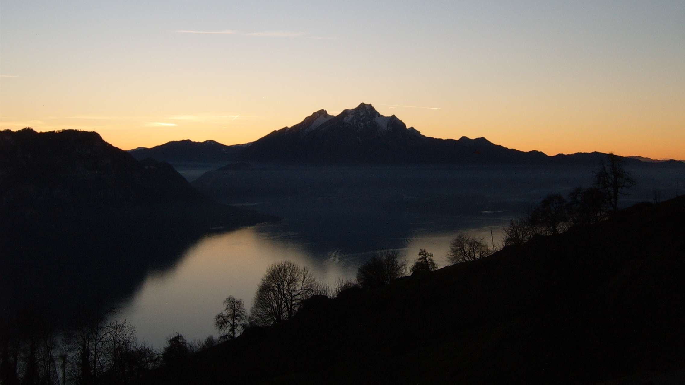 Pilatus and Lake Lucerne (Switzerland)